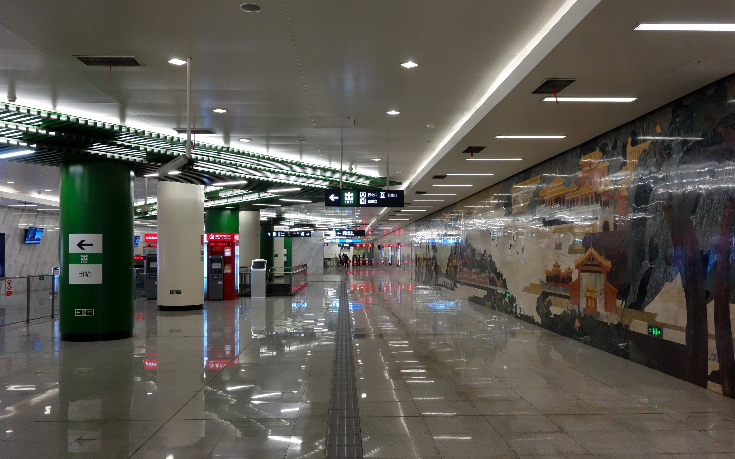 北海北站站厅层